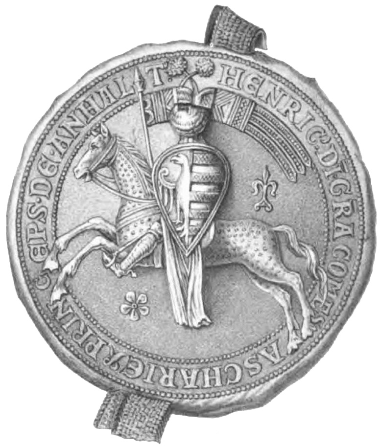 Siegel der Fürsten Heinrich I. und Heinrich II. von Anhalt (Original veröffentlicht im Codex diplomaticus anhaltinus, Band 2)